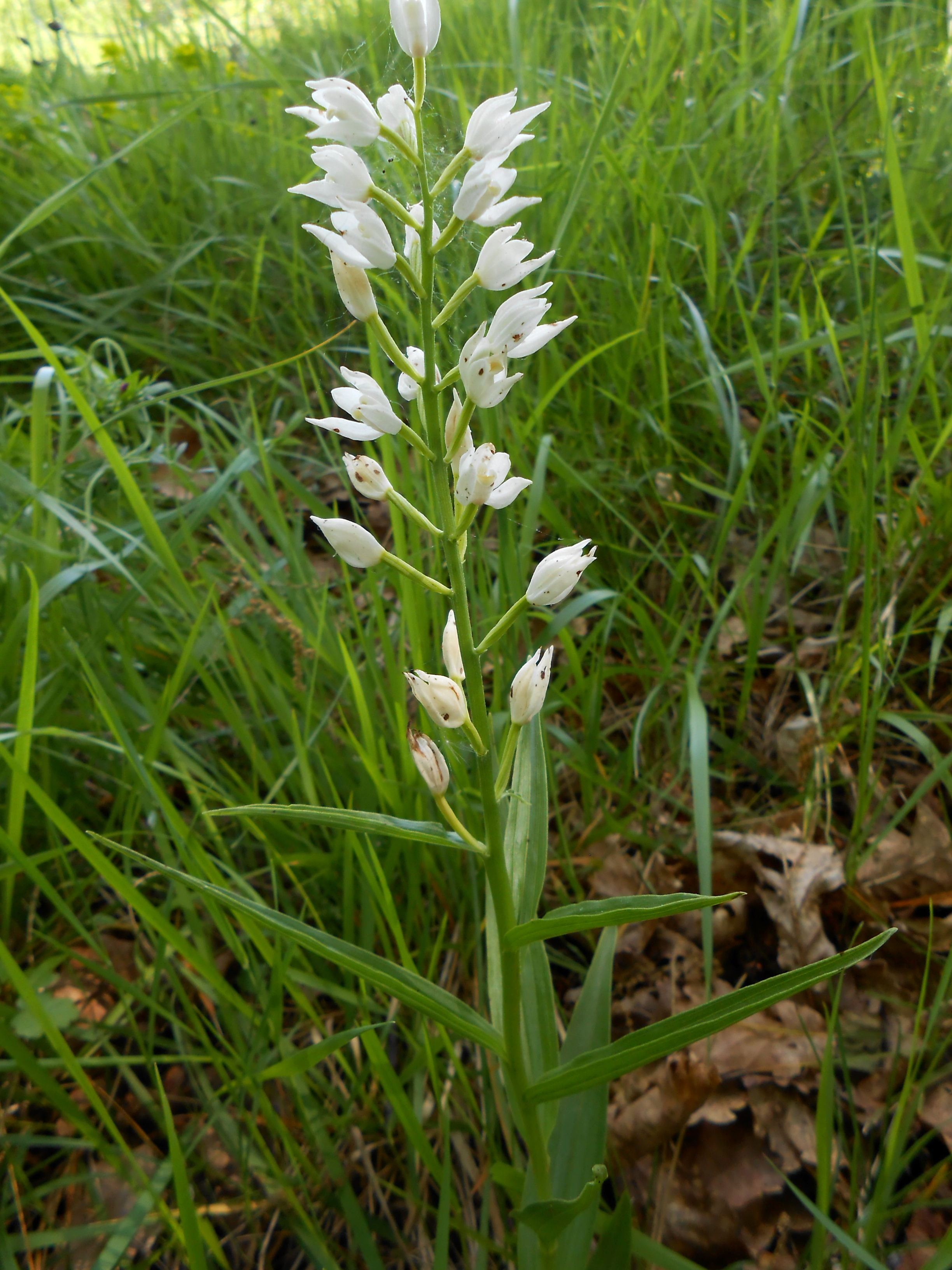 Céphalanthère à feuilles étroites sur une colline près de Javerlhac, Dordogne.